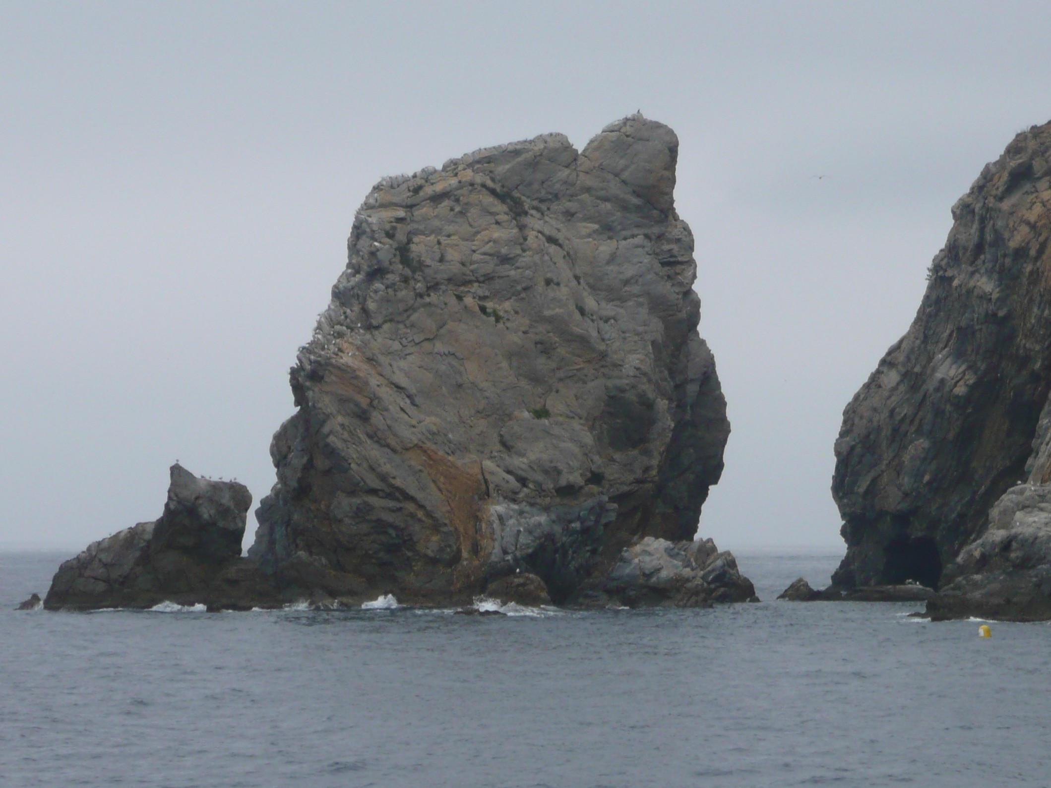 El Gat am Cap Norfeu im Nationalpark Cap de Creus - Ostseite